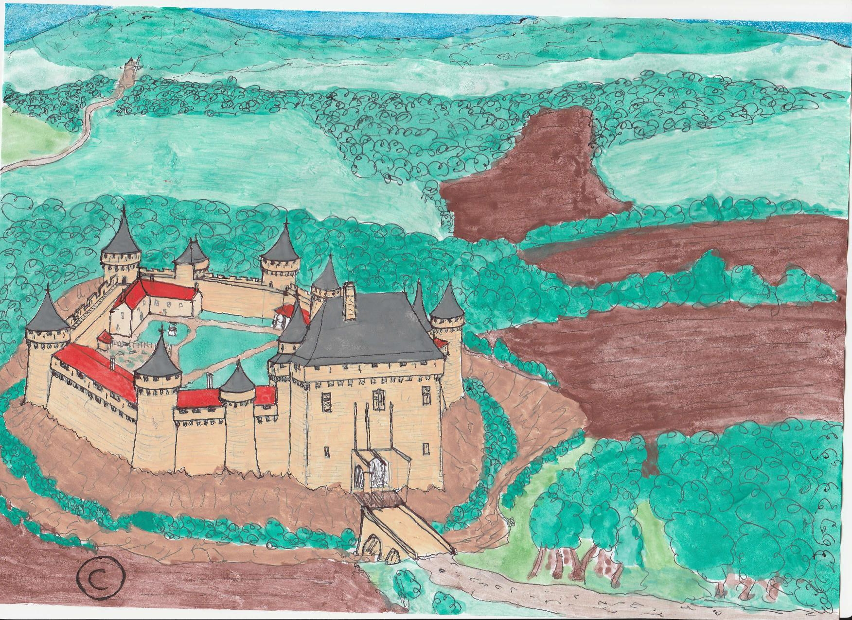 Vue artistique de la forteresse de Sigournais à la fin du XVe siècle, aquarelle.